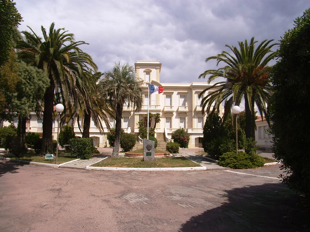 Château Gallieni, Fréjus (83)